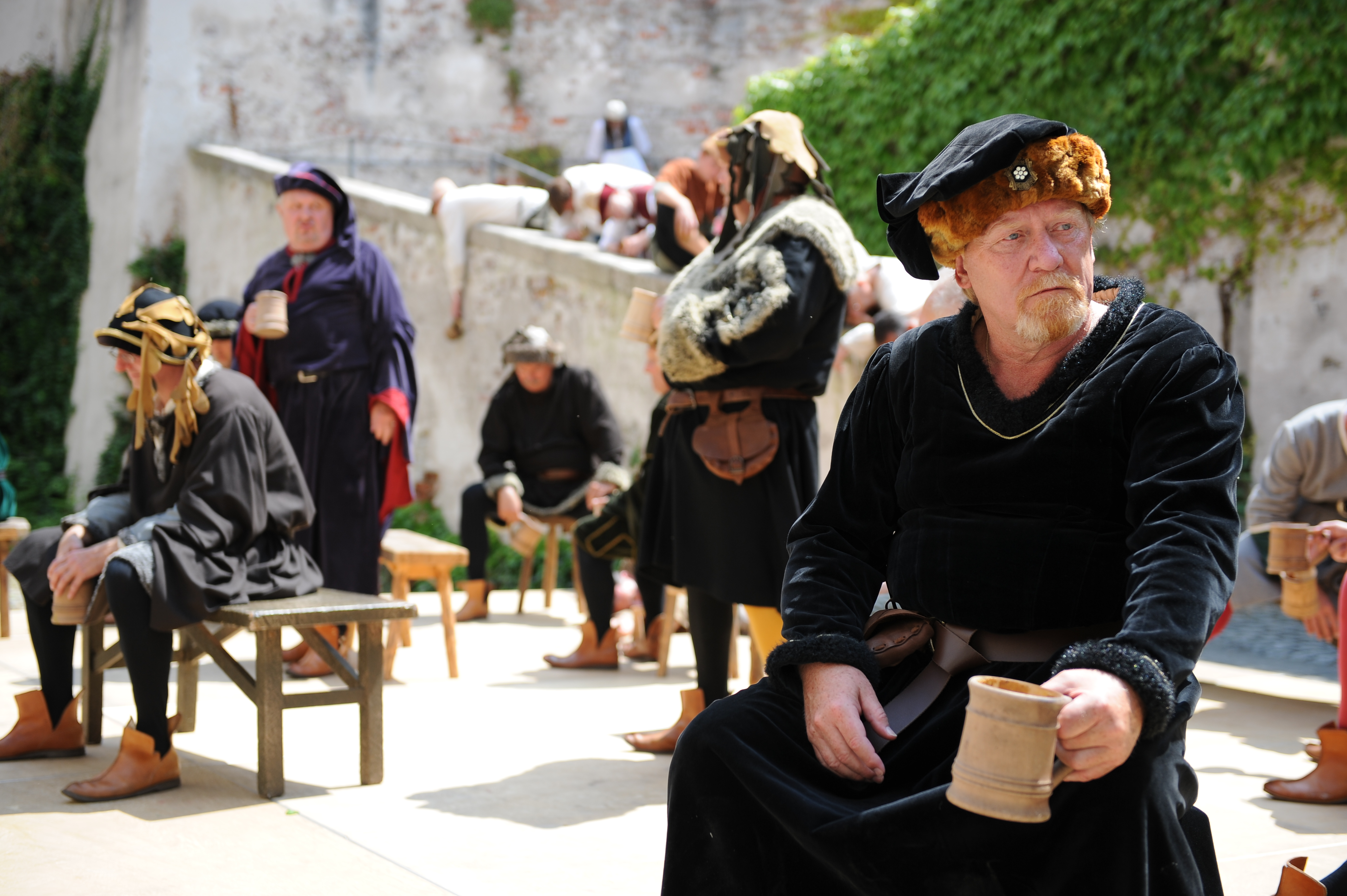 Szene aus einer Probe zu Carl Orffs "Die Bernauerin" 2013